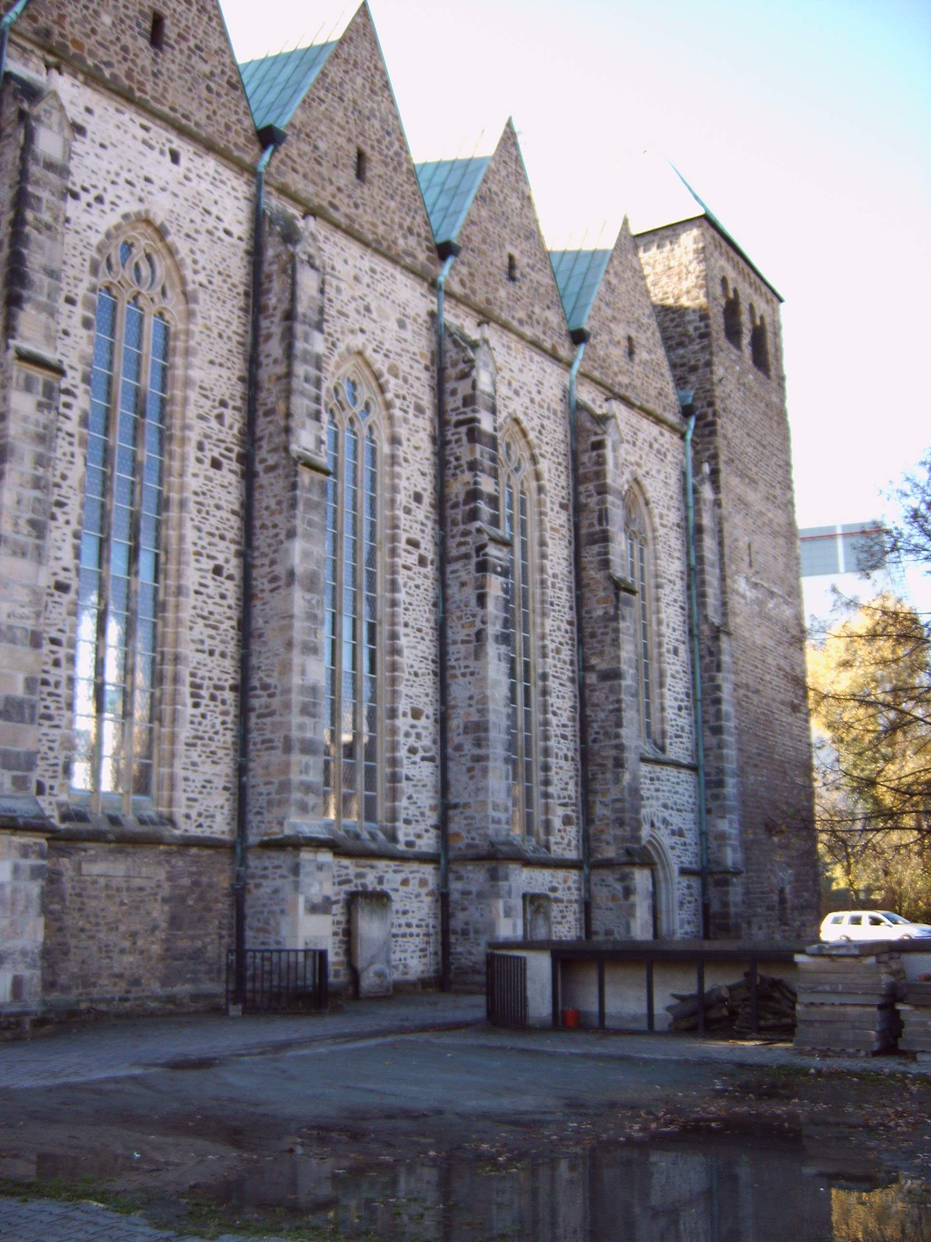 Sankt-Petri-Kirche Magdeburg, Nordseite, am 6.11.2005 fotografiert von Olaf2